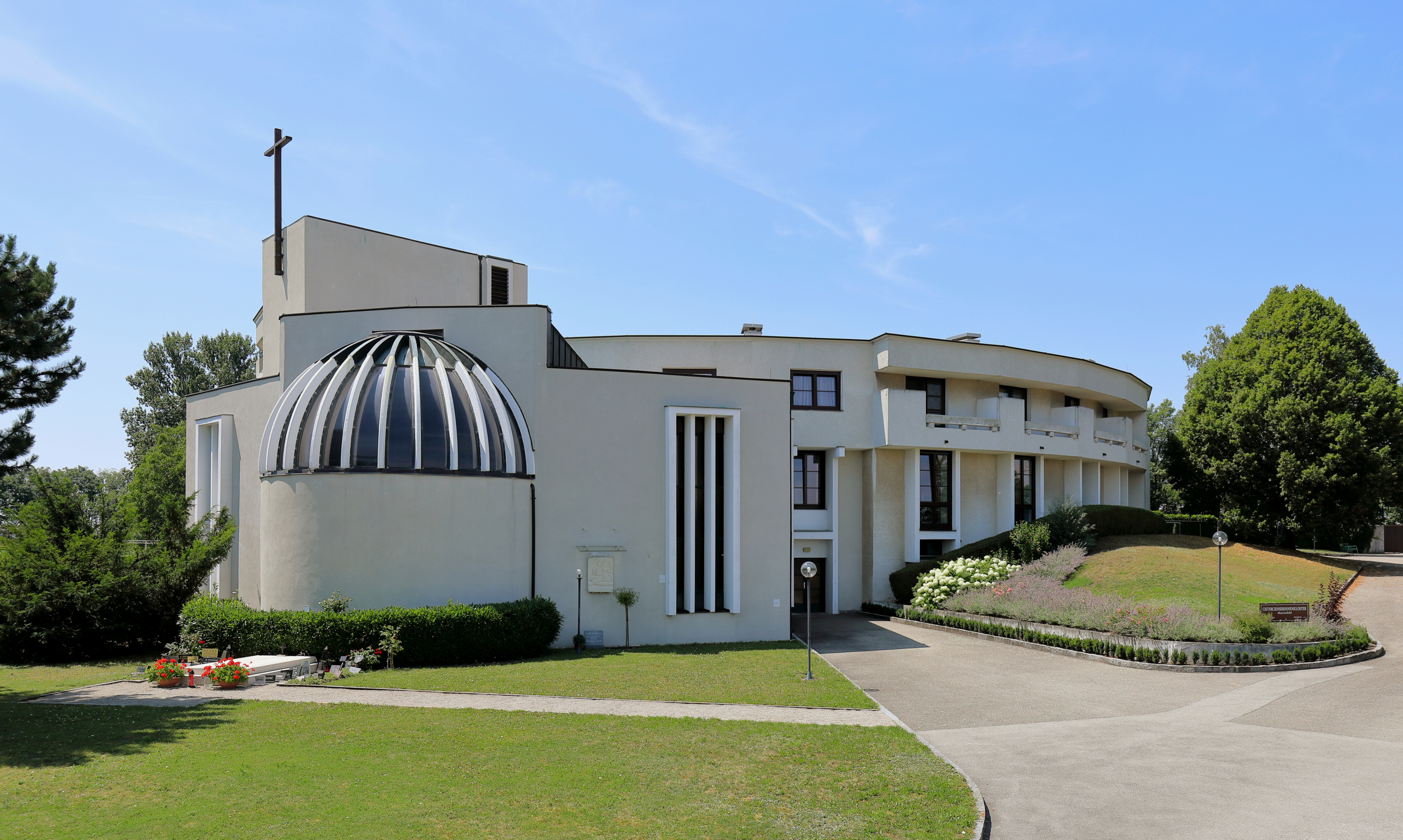 Ostansicht des Klosters Marienfeld in Maria Roggendorf, ein Ortsteil der niederösterreichischen Marktgemeinde Wullersdorf und links das Grabmal von Kardinal Hans Hermann Groër.Das Kloster mit der Adresse Maria Roggendorf 49 wurde ab Mitte der 1970er Jahre nach Plänen des Architekten Walter Hildebrand errichtet und am 14. November 1982 geweiht. Es befindet sich rund 1 Km südwestlich des Dorfes Maria Roggendorf auf einer kleinen Anhöhe.